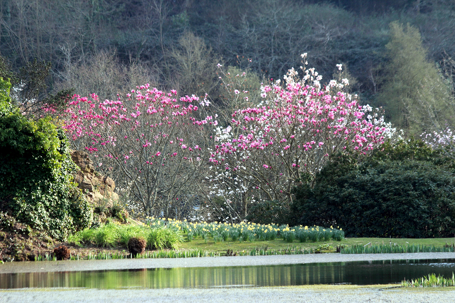 Ambiance printanière